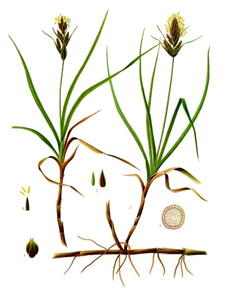 Sandsegge. A blühende Pflanze. 1 Querschnitt des Rhizoms; 2 männliche Blüte vom Rücken aus gesehen; 3 Schlauch der weiblichen Blüte mit Deckblatt; 4 Fruchtschlauch, beinahe reif. — A natürliche Grösse, 1 bis 4 vergrössert.